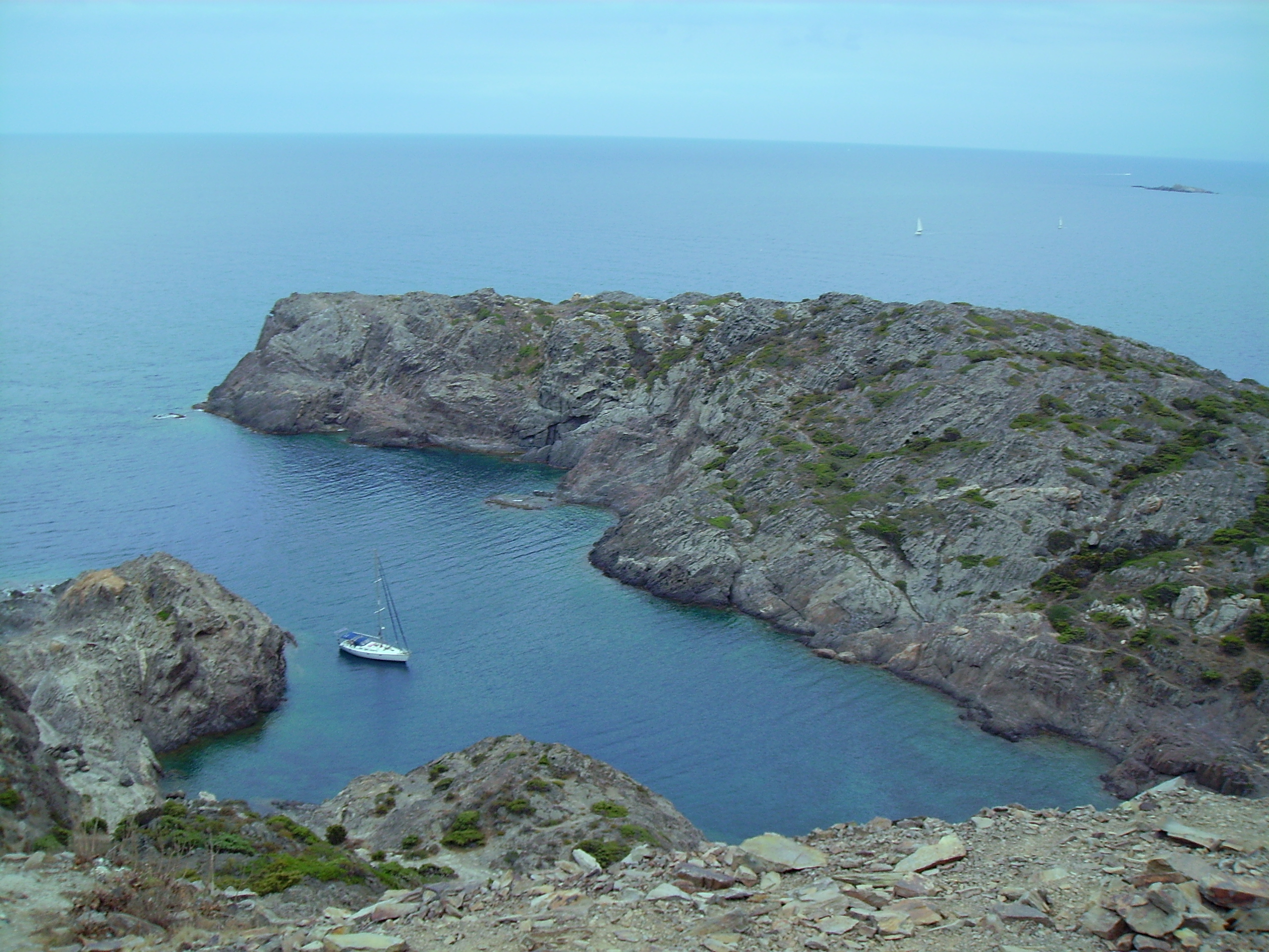 Cap de Creus, Alt Empordà, Catalunya